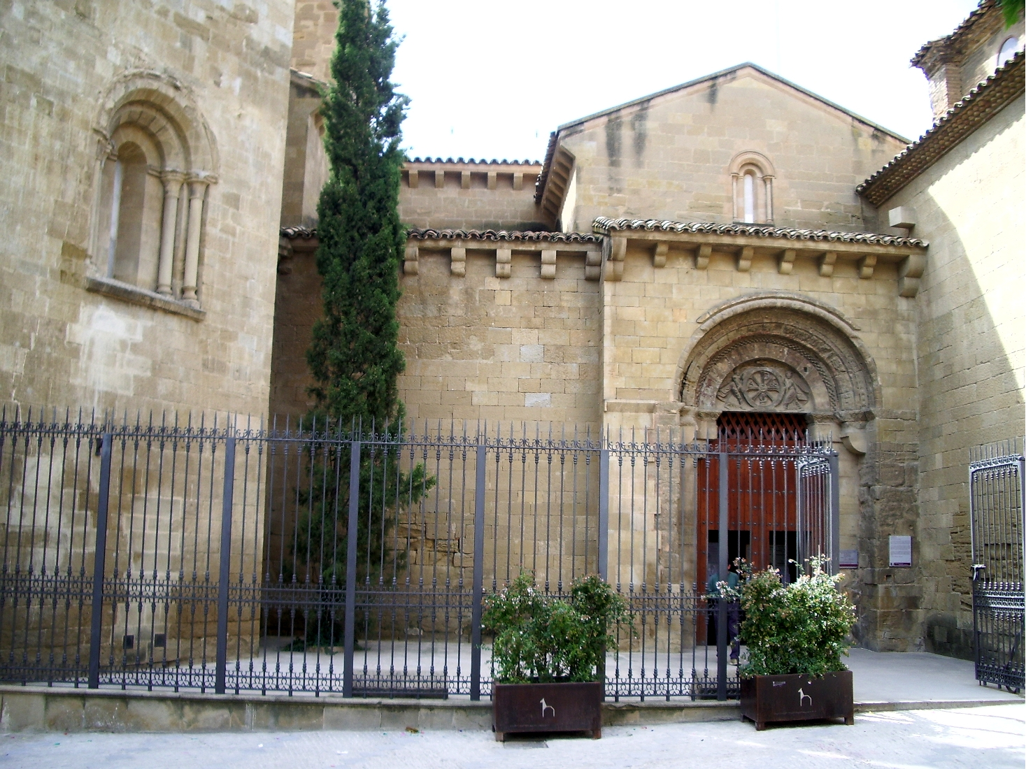 Monasterio de San Pedro el Viejo (Huesca, España)